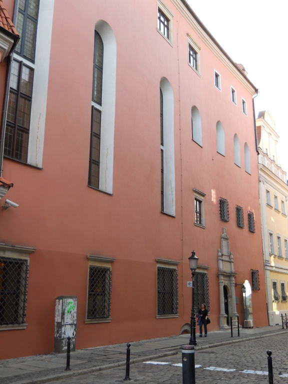 Poznań, ul. Wodna 27 - Pałac Górków, obecnie Muzeum Archeologiczne